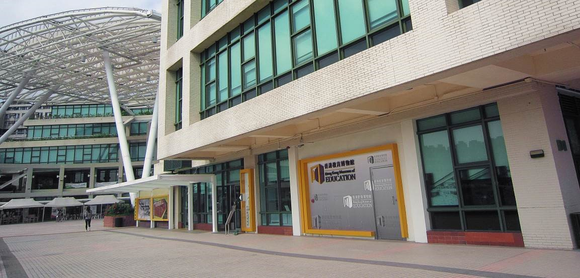 香港教育博物館外觀